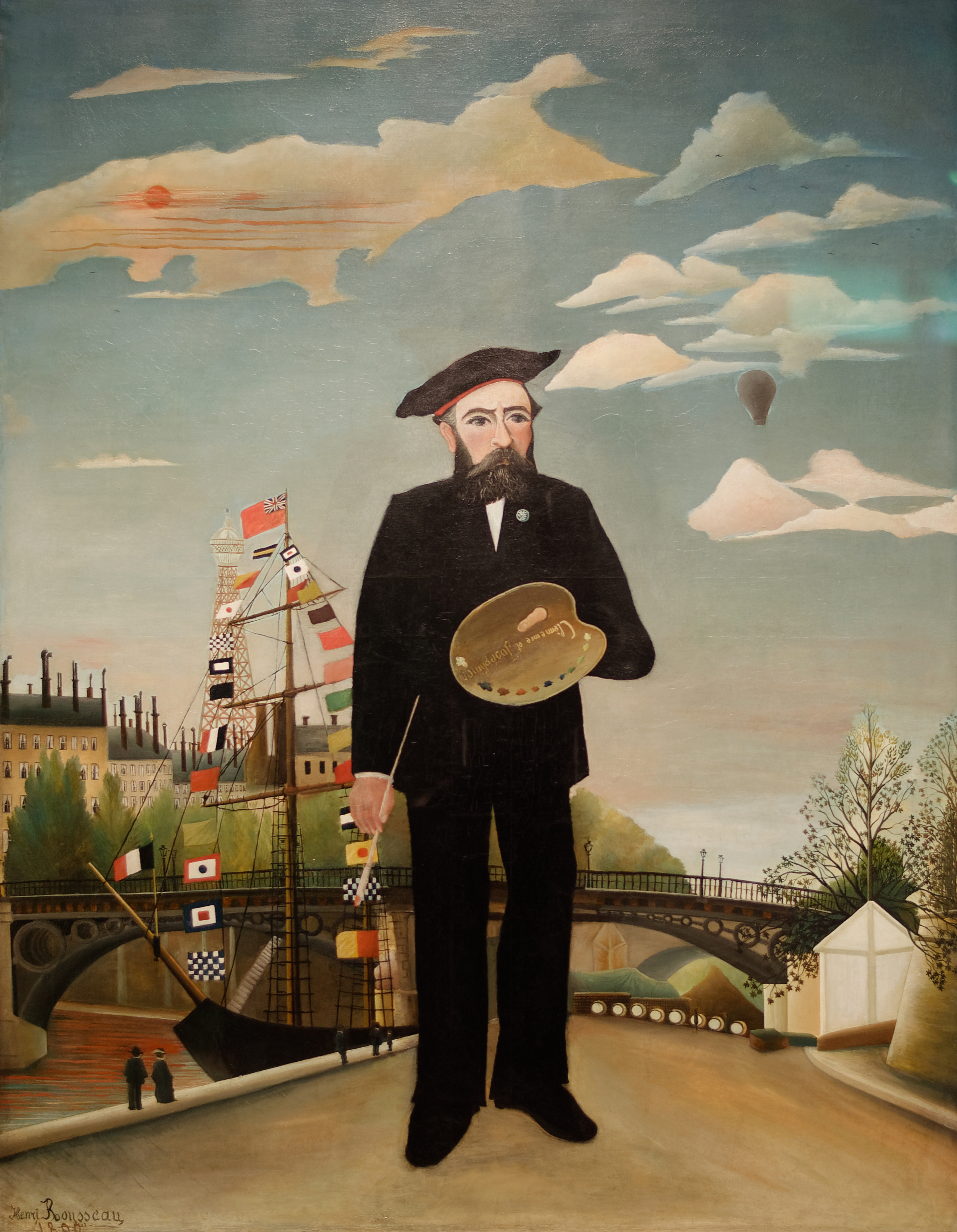 Moi-même, Portrait-paysage, Henri Rousseau. Huile sur toile exposée à la galerie nationale de Prague. Acquis en 1923 de la collection Walther Halvorsen